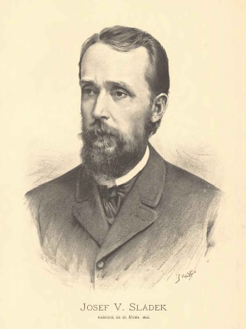 Portréty českých osobností od Jana Vilímka